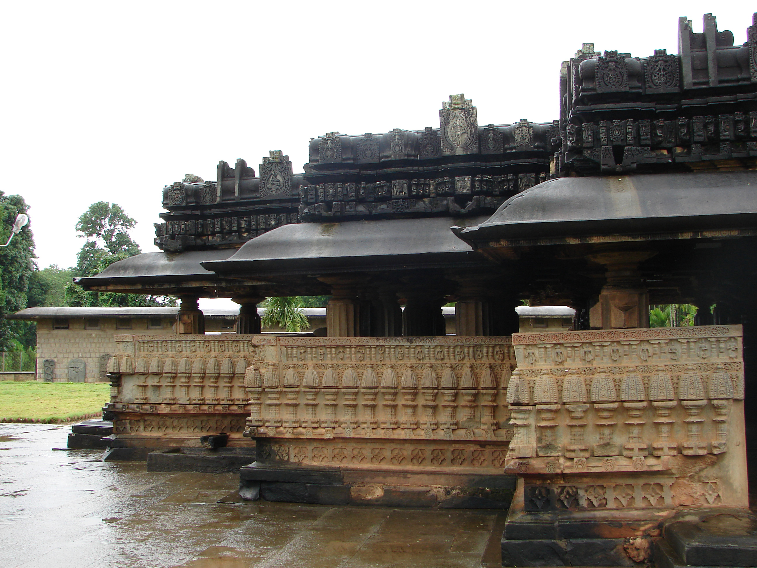 Kedareshwara temple in Balligavi, Karnataka, India